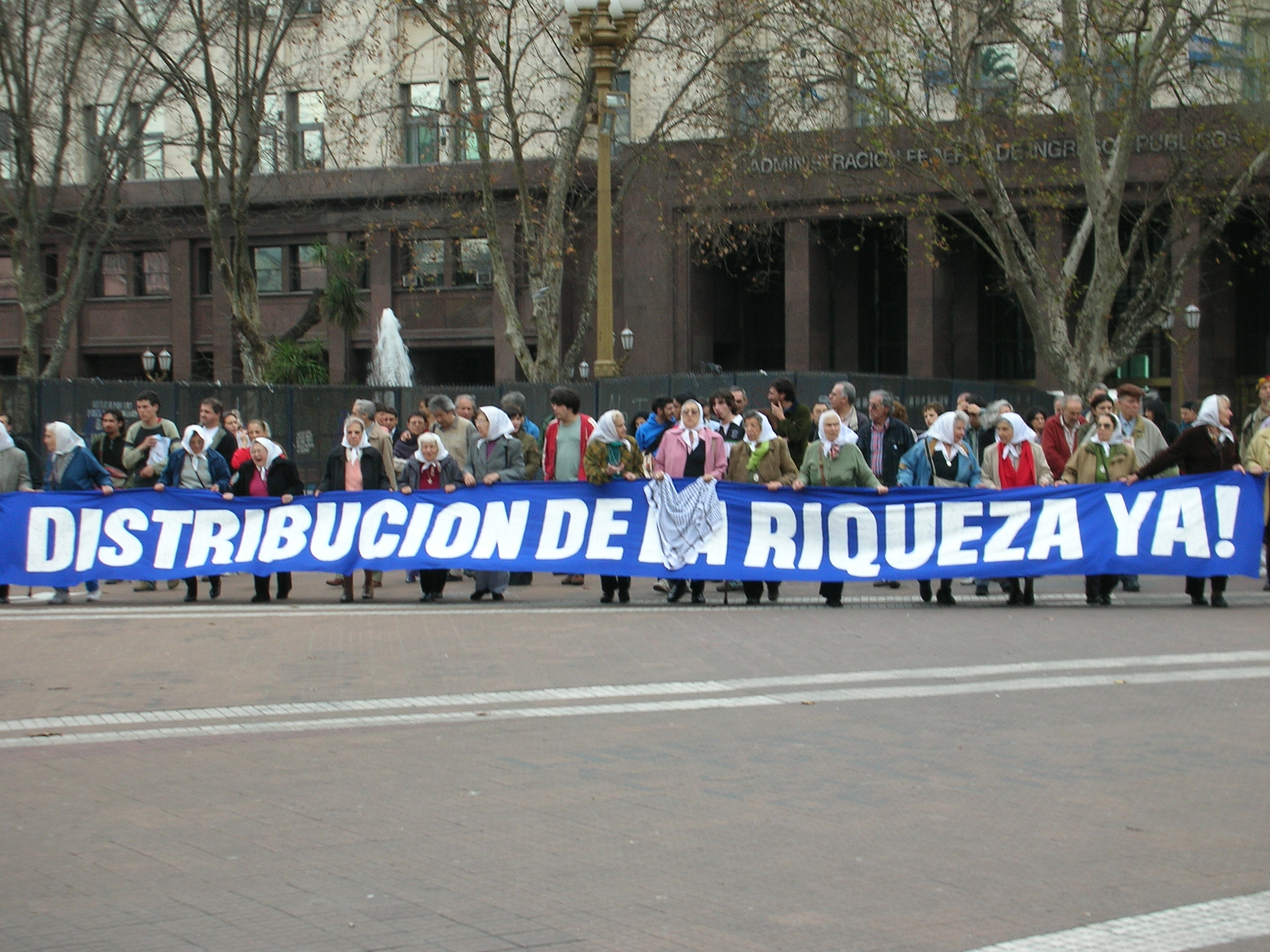 Asociación Madres de la Plaza de Mayo ( Buenos Aires)